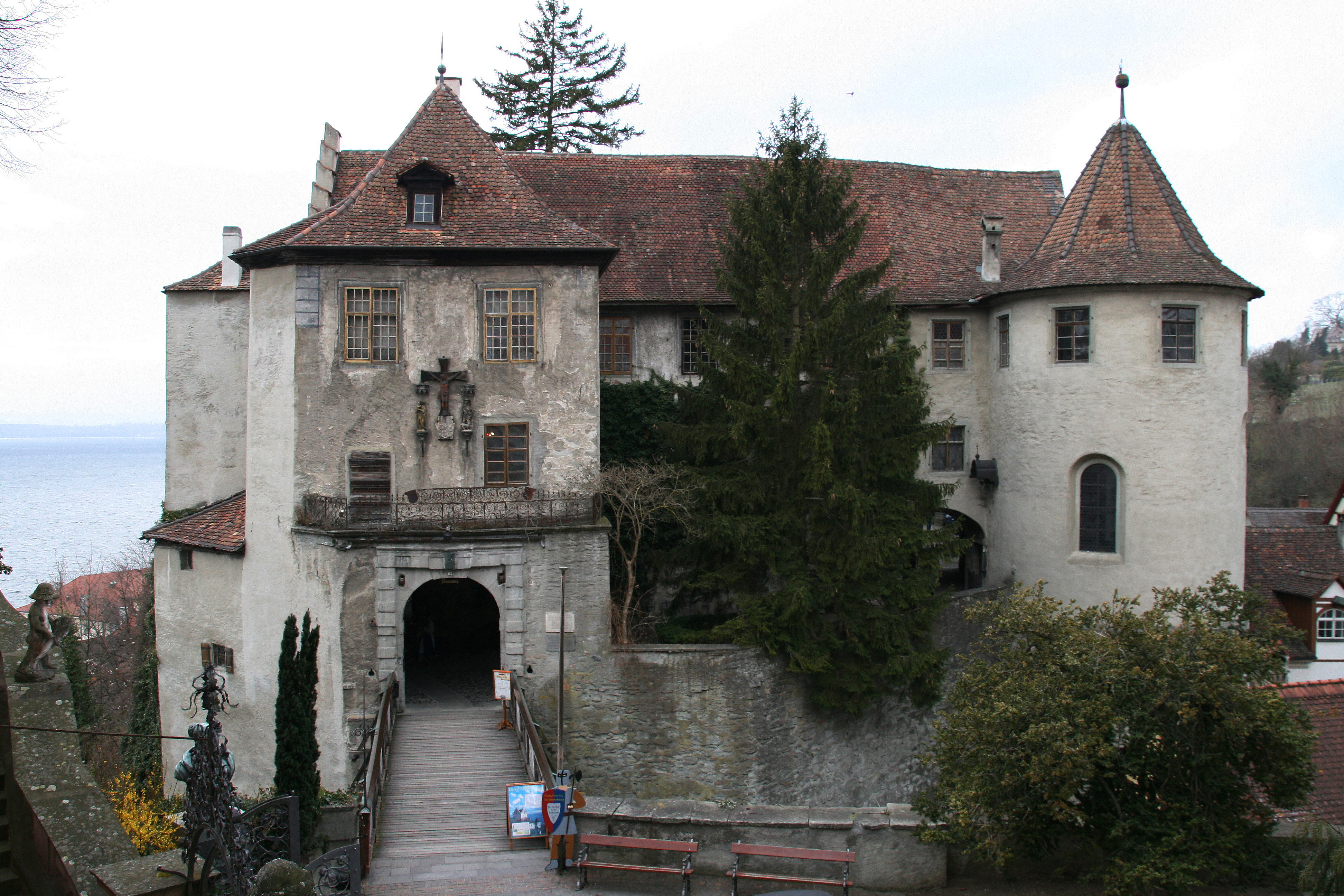 Ostseite und Eingang über dem Burggraben der Burg Meersburg in Meersburg am Bodensee. Blick vom Schlossgarten des Neuen Schlosses